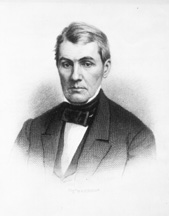 Walter Lowrie, former U.S. senator from Pennsylvania